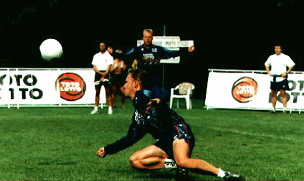 Faustball-Abwehr durch Ex-Nationalspieler Ralf Kallmeyer (Turnerschaft Hannover), Weltpokal-Endspiel TH 52 - Sogipa Porto Alegre (Bra) am 17.08.1997